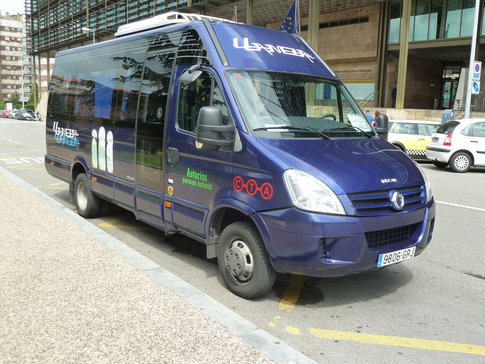 Bus